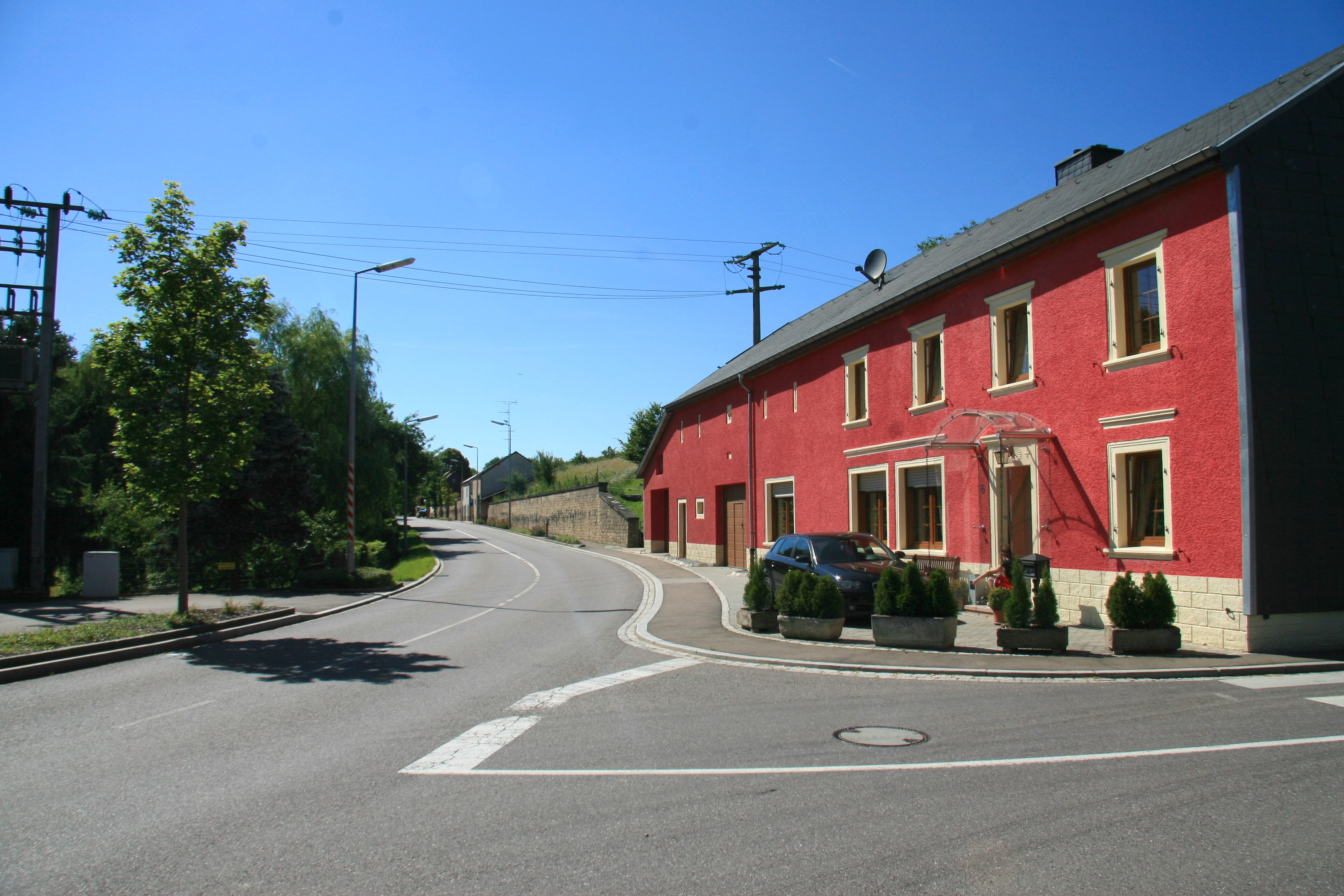 Buddelerbaach, d'Haaptstrooss - user Ioni